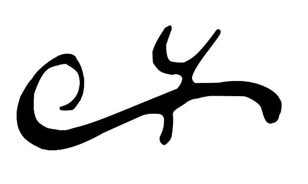 Сочетание надстрочных букв "р" и "у" в скорописи (по книге Черепнина Л.В. "Русская палеография")